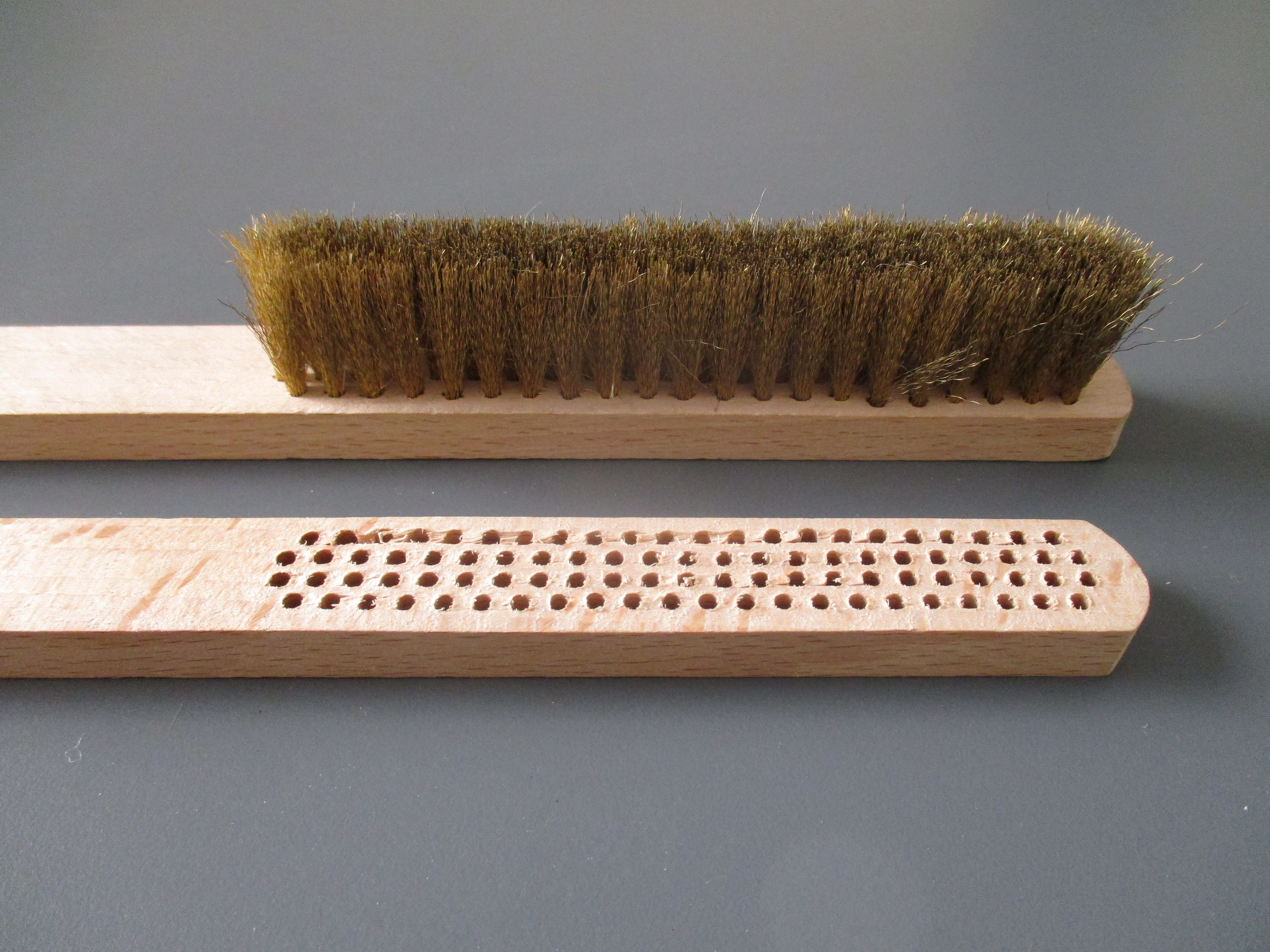 Monture de brosse en bois percée et brosse à filet garnie de fibres de laiton ondulé (Cardot MFBI)